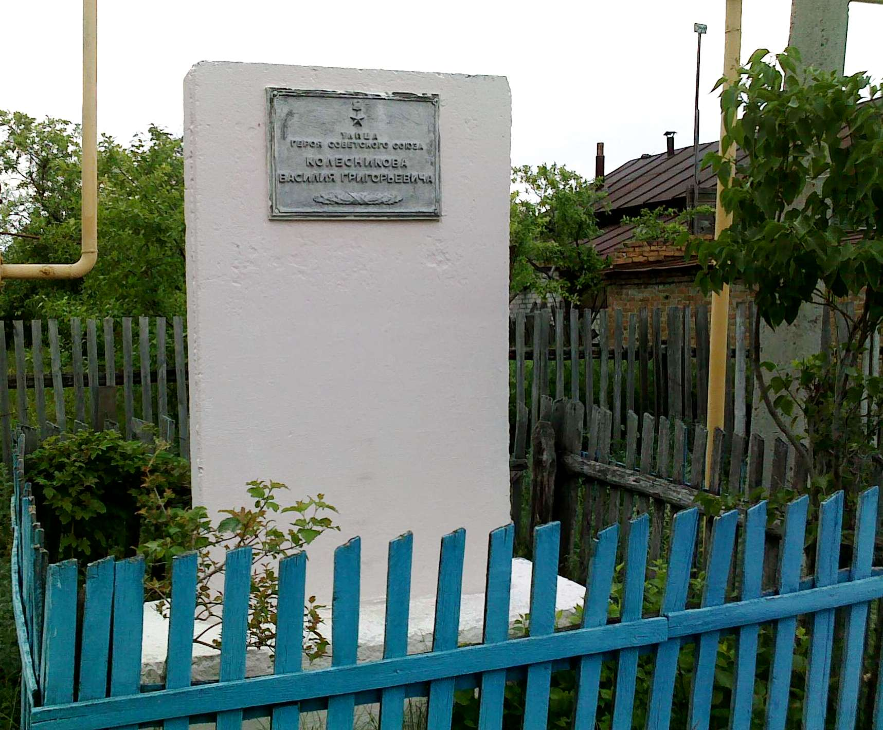 Село Новодевичье, Улица Героя Советского Союза Колесникова В.Г,Памятная стела.